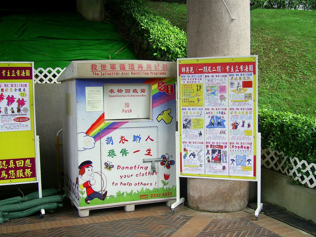 中文（香港）: 香港救世軍位於錦英苑的衣物回收箱